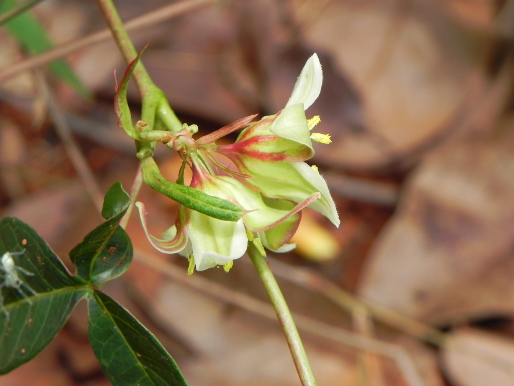 Manihot gracilis Pohl - EUPHORBIACEAE - Jardim Botânico de Brasília - Brasília - Distrito Federal - Brasil.